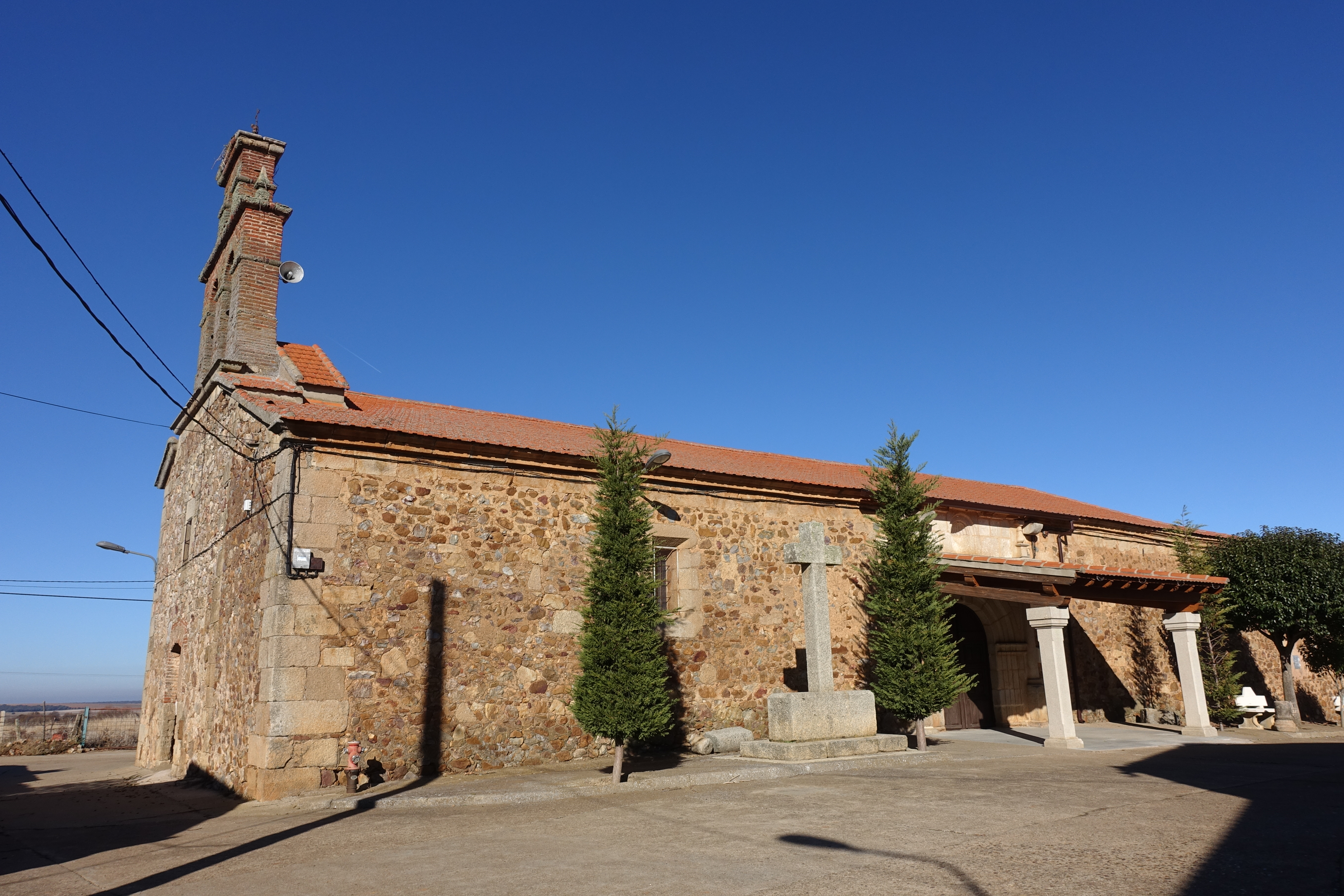 Iglesia de San Pedro Ad Vincula, Sepulcro-Hilario (Salamanca, España).